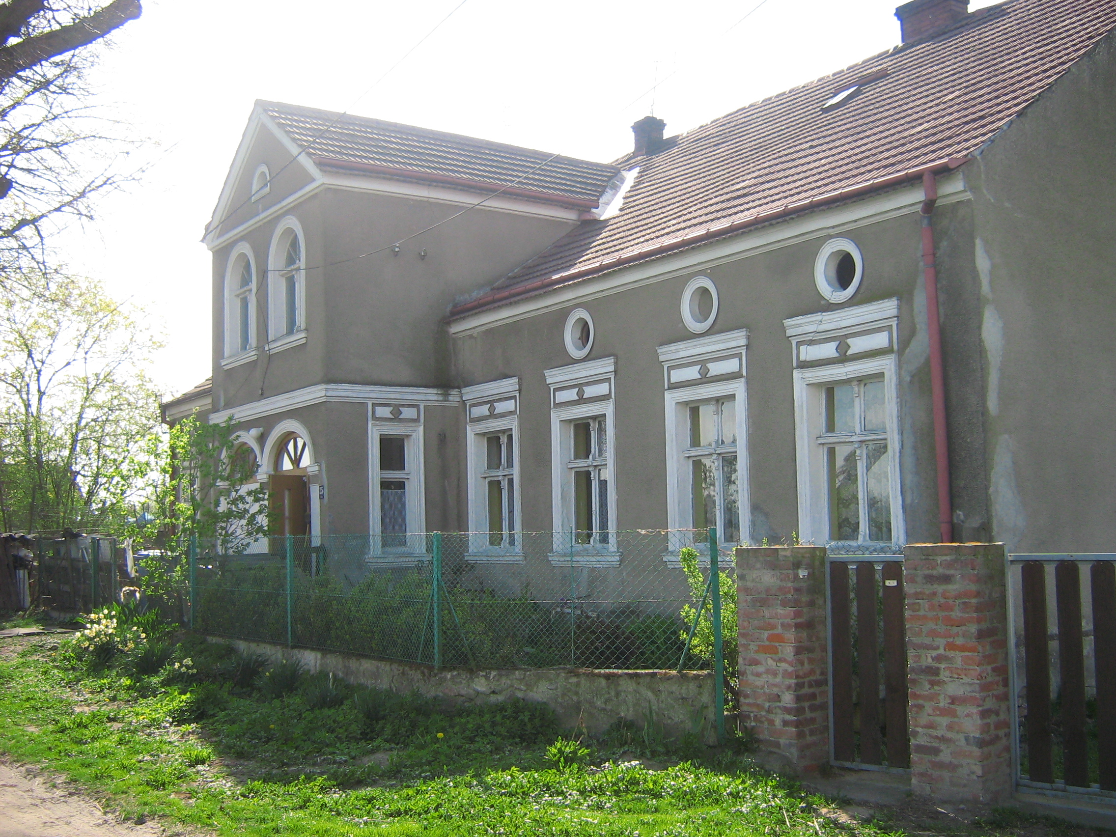 Dom z numerem "25" w Zastaniu